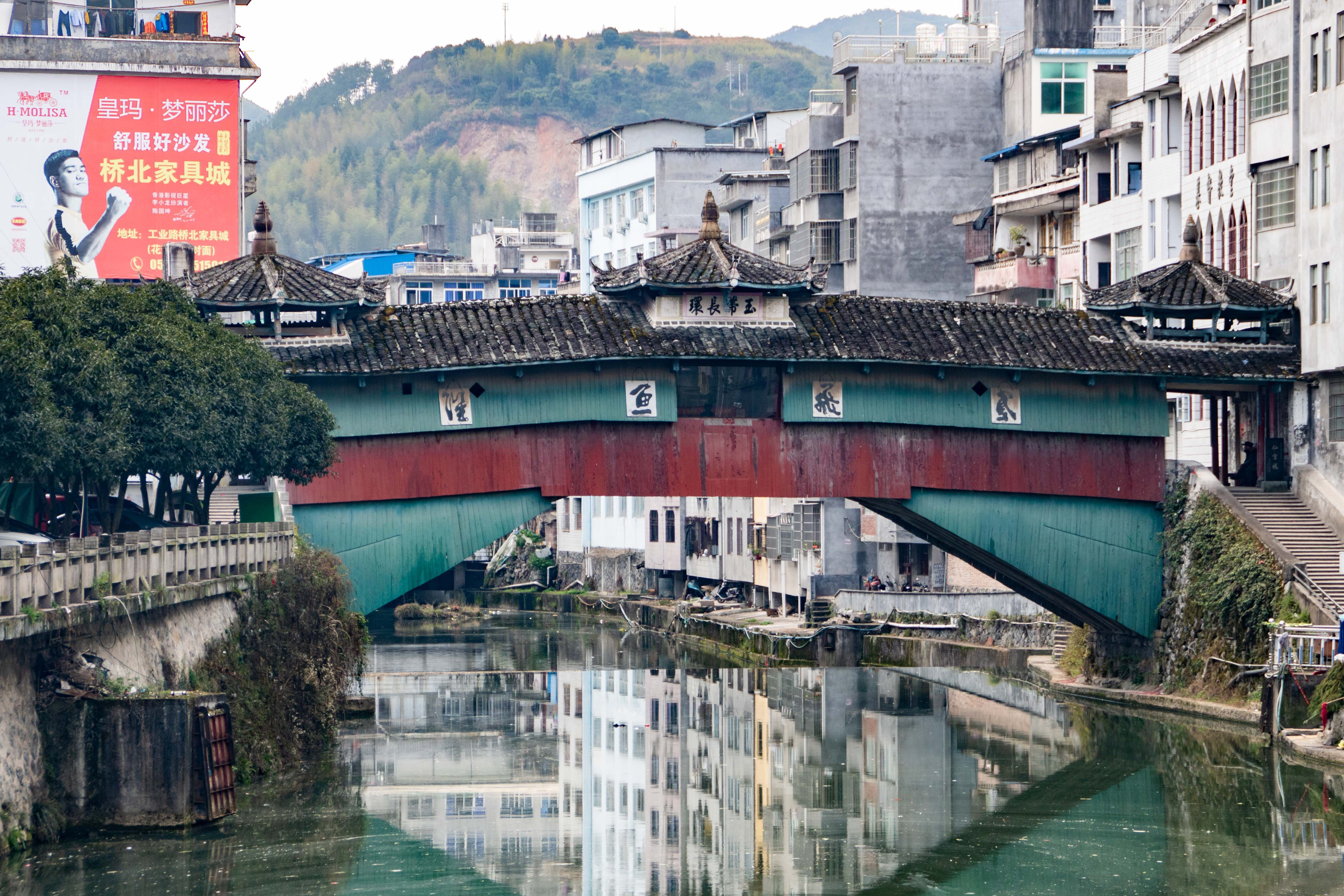 中文（中国大陆）: 寿宁县鳌阳镇仙宫桥（玉带桥）